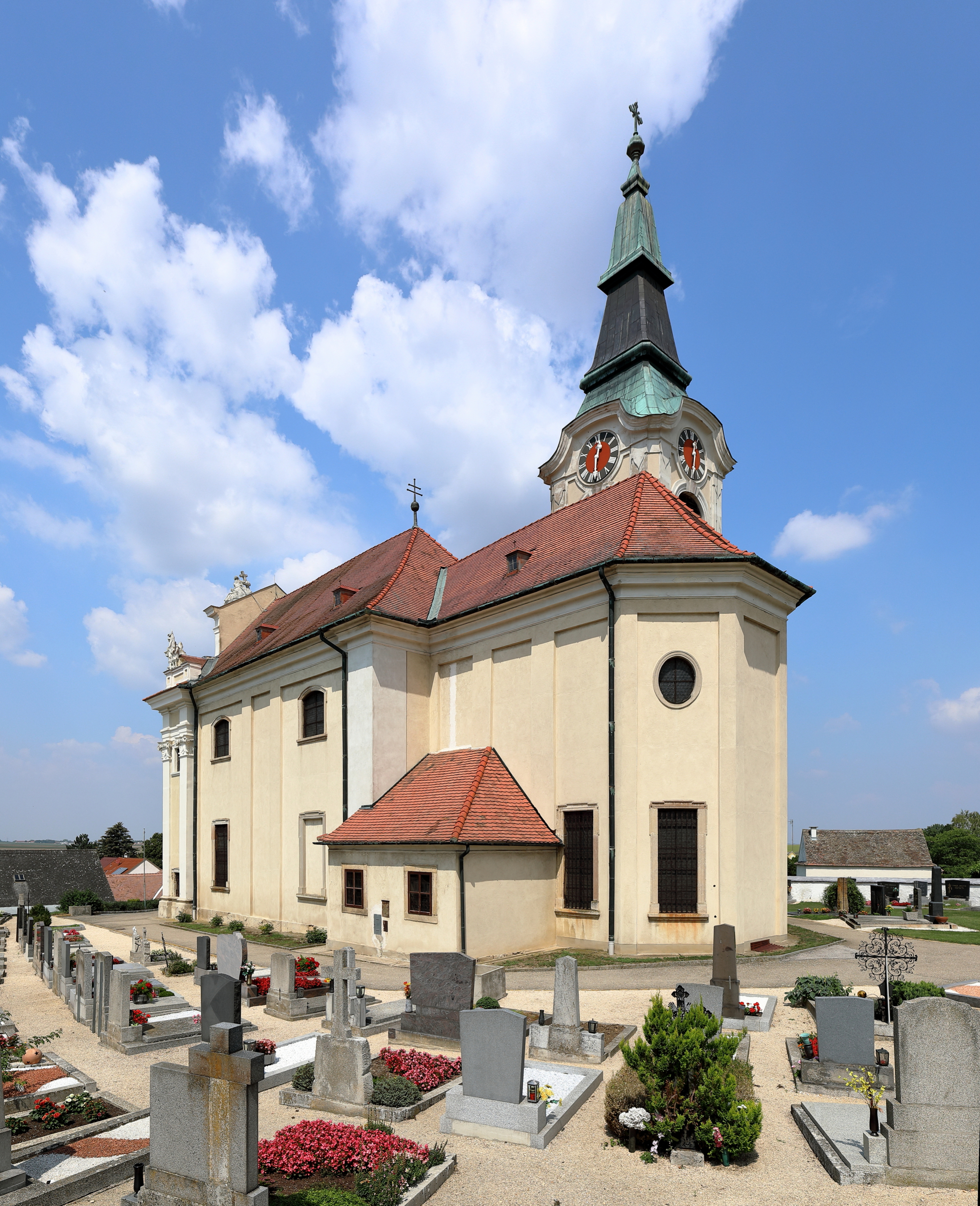 Südostansicht der röm.-kath. Pfarrkirche hl. Georg in Aspersdorf, ein Ortsteil der niederösterreichischen Stadtgemeinde Hollabrunn. Die spätbarocke Saalkirche mit im Kern gotischem Chor sowie Nordturm wurde in der ersten Hälfte des 18. Jahrhunderts barockisiert bzw. im Prinzip neu errichtet.